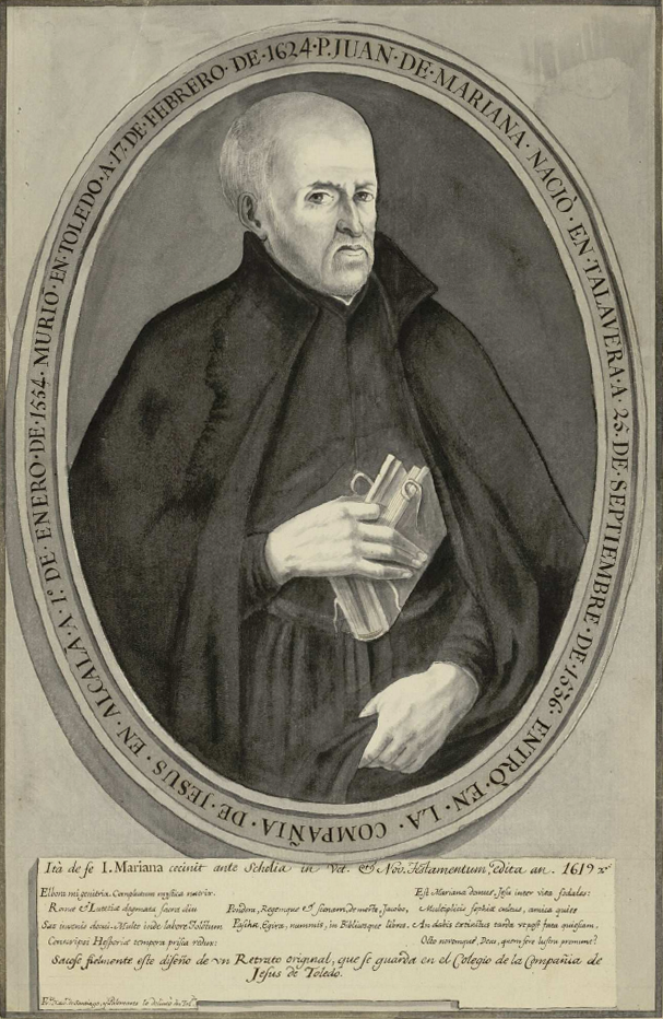 Retrato de Juan de Mariana, realizado en 1752 por Francisco Javier de Santiago Palomares. Dibujo sobre papel agarbanzado pluma, tinta y aguadas grises y negras. Inscripción ms. a tinta negra en la cartela: "Ità de se I. Mariana cecinit ante Scholia in Vet. et Nov. Testamentum, edita an. 1619 / Elbora mi genitrix. Complutum mystica nutrix. / Romæ et Lutetiæ dogmata sacra diu / Sat invenis docui. Multo inde labore Toletum / Conscripsi Hesperiæ tempora prisca redux: / Pondera, Regemque et scenam, de morte, Jacobo, / Pascha, Egira, nummis, in Biblicosque libros. / Est Mariana domus, Jesu inter vita fodales: / Multiplicis sophia cultus, amica quies / An dabis extinctus tarda ut post fata quiescam, / Octo novemque, Deus, quem fere lustra premunt? / Sacose fielmente este diseño de un Retrato original, que se guarda en el Colegio de la Compañía de / Jesus de Toledo. "